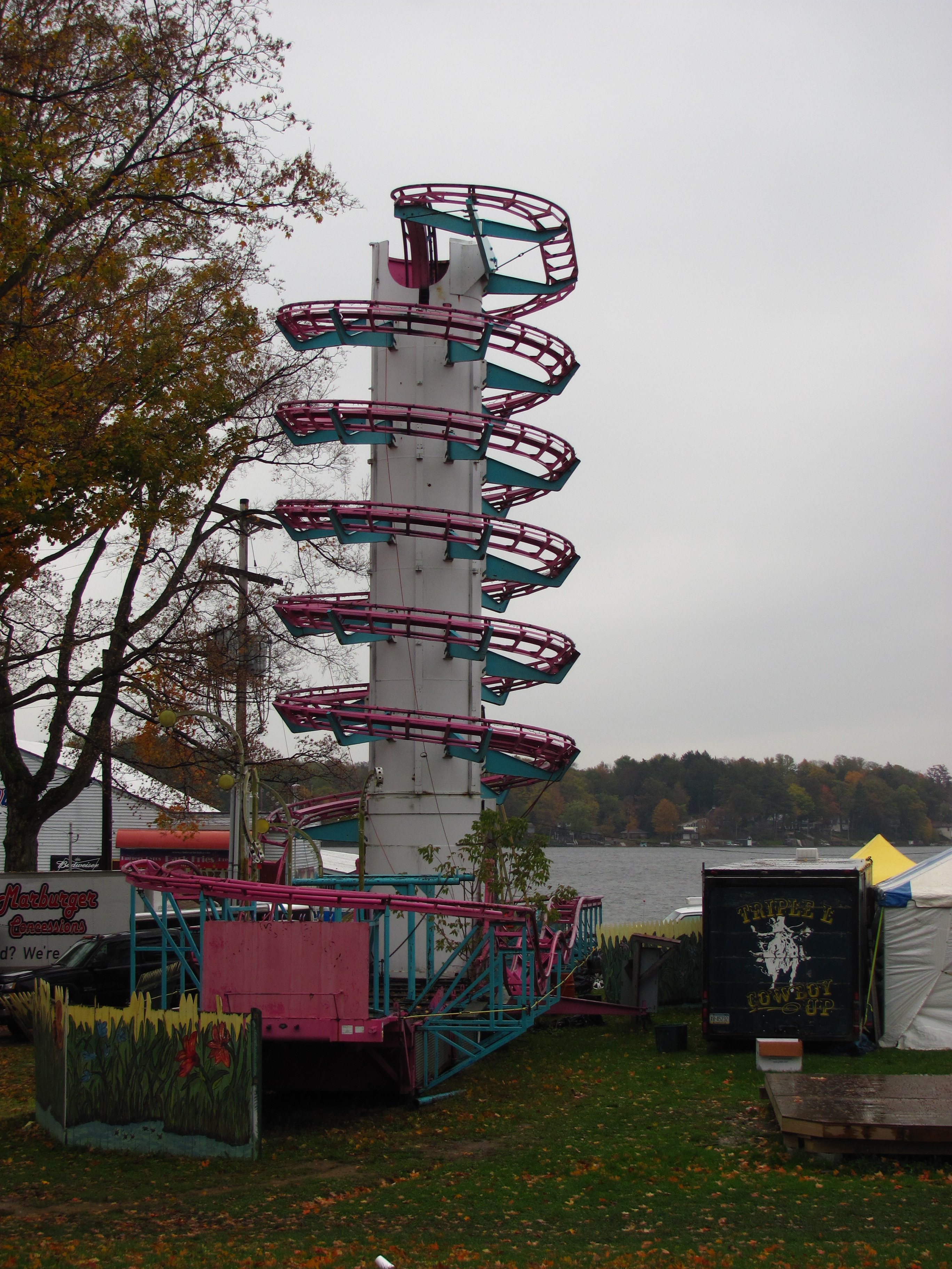 Toboggan